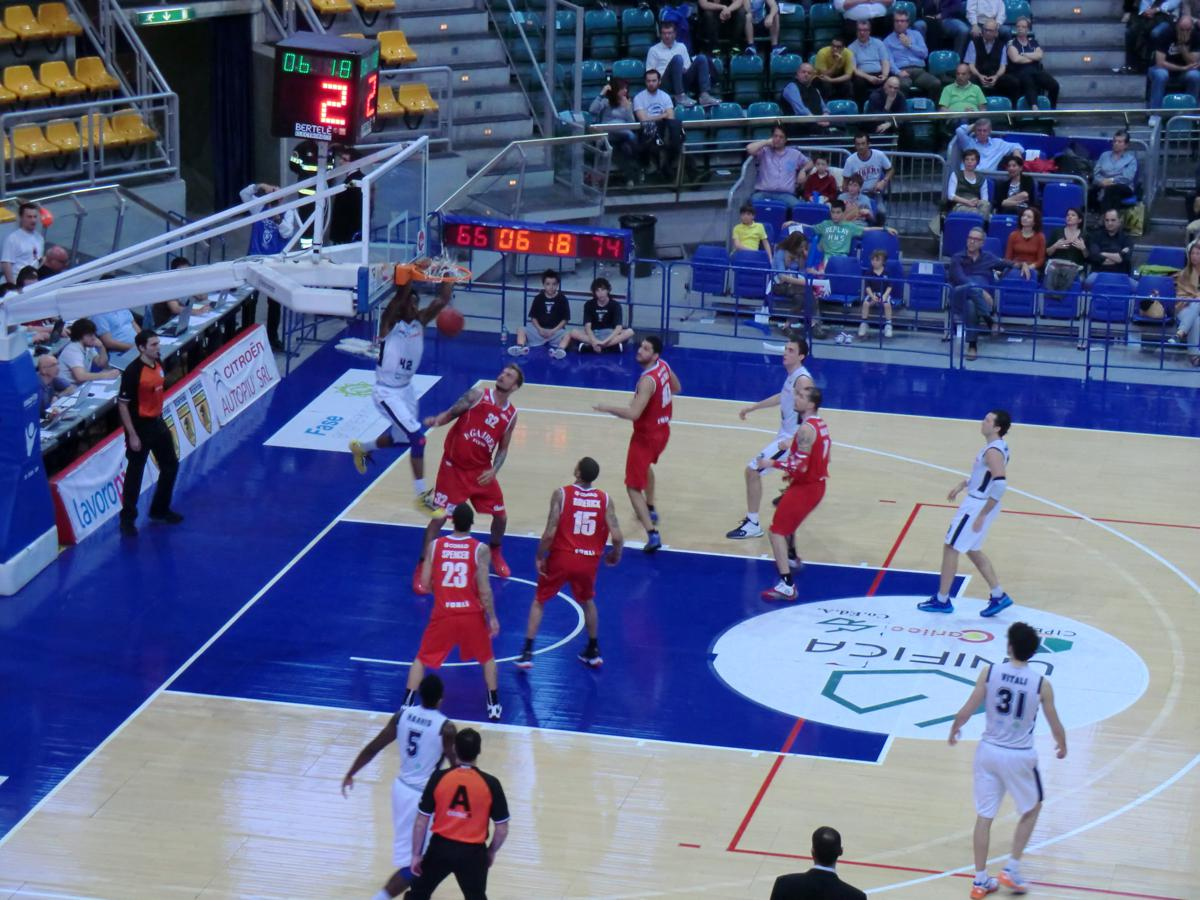 Alcune immagini scattate in occasione dell'incontro di LegaDue tra Bologna e Forlì al PalaDozza di Bologna.